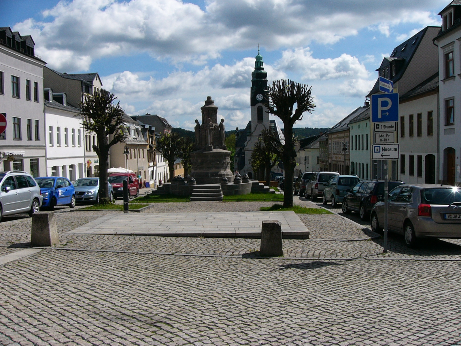 Adorf, Marktplatz